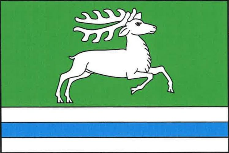 Běleč Brno venkov, vlajka